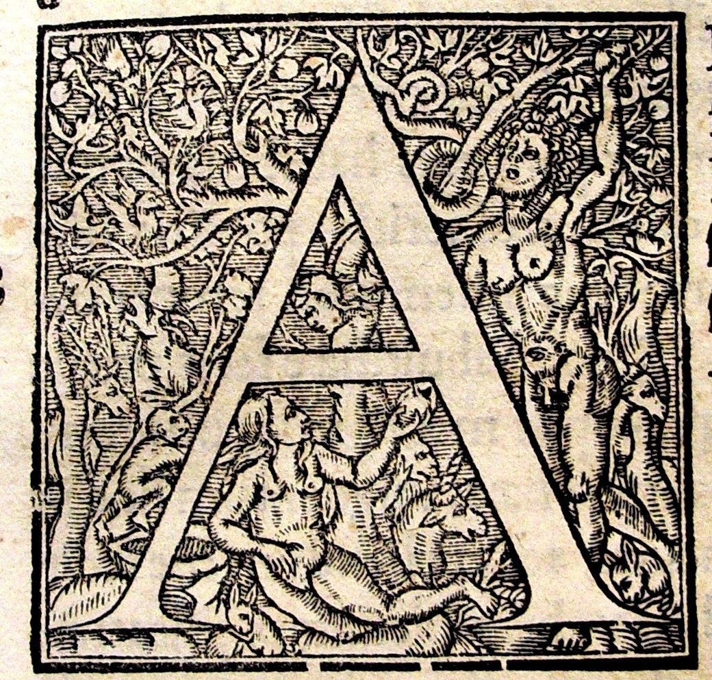 Irurozqui, Series totius Sancti Evangellii, Estella, Adrián de Amberes, 1557, capitular A con las imágenes de Adán y Eva en el Paraíso